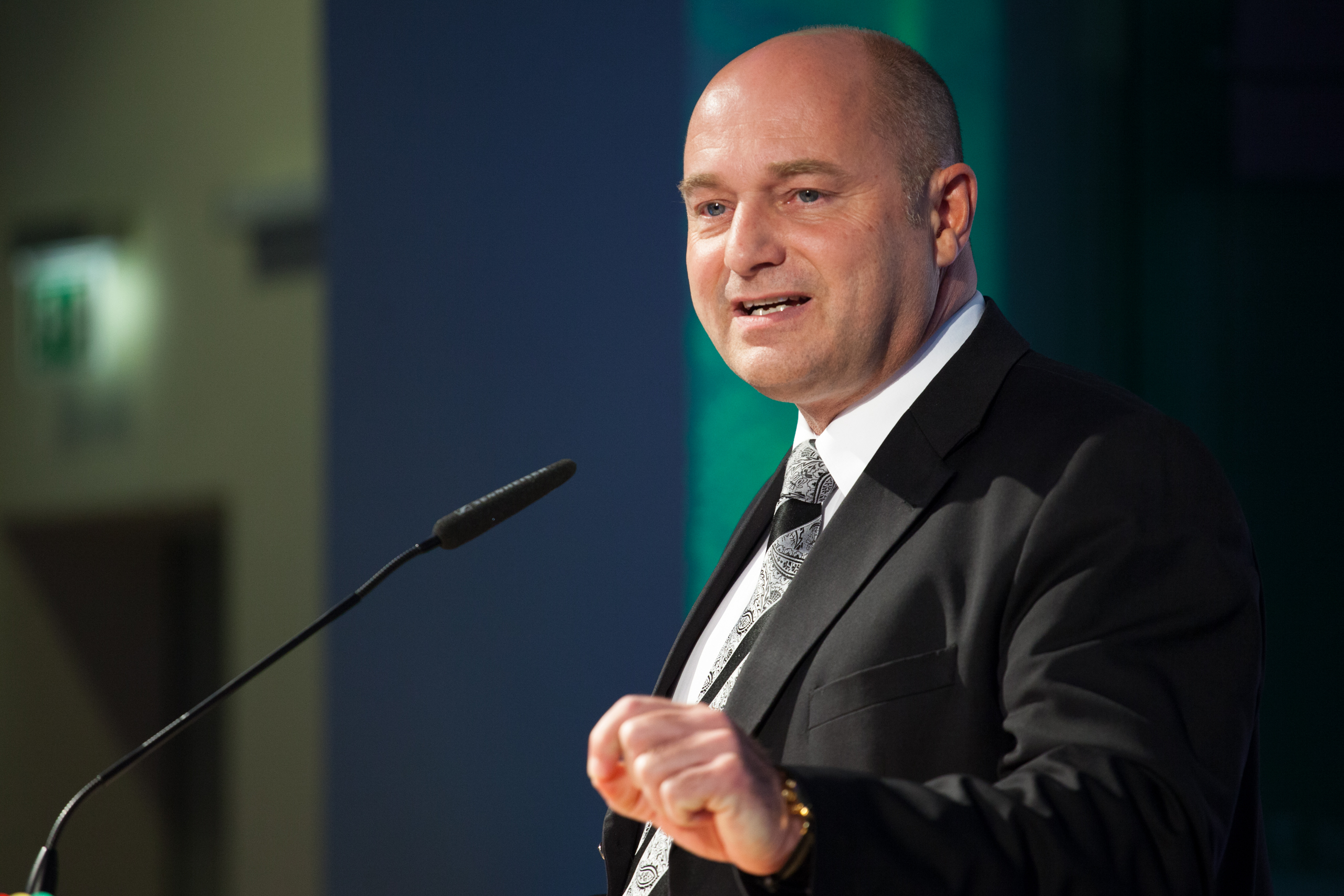 Rainer Bomba bei einer Rede